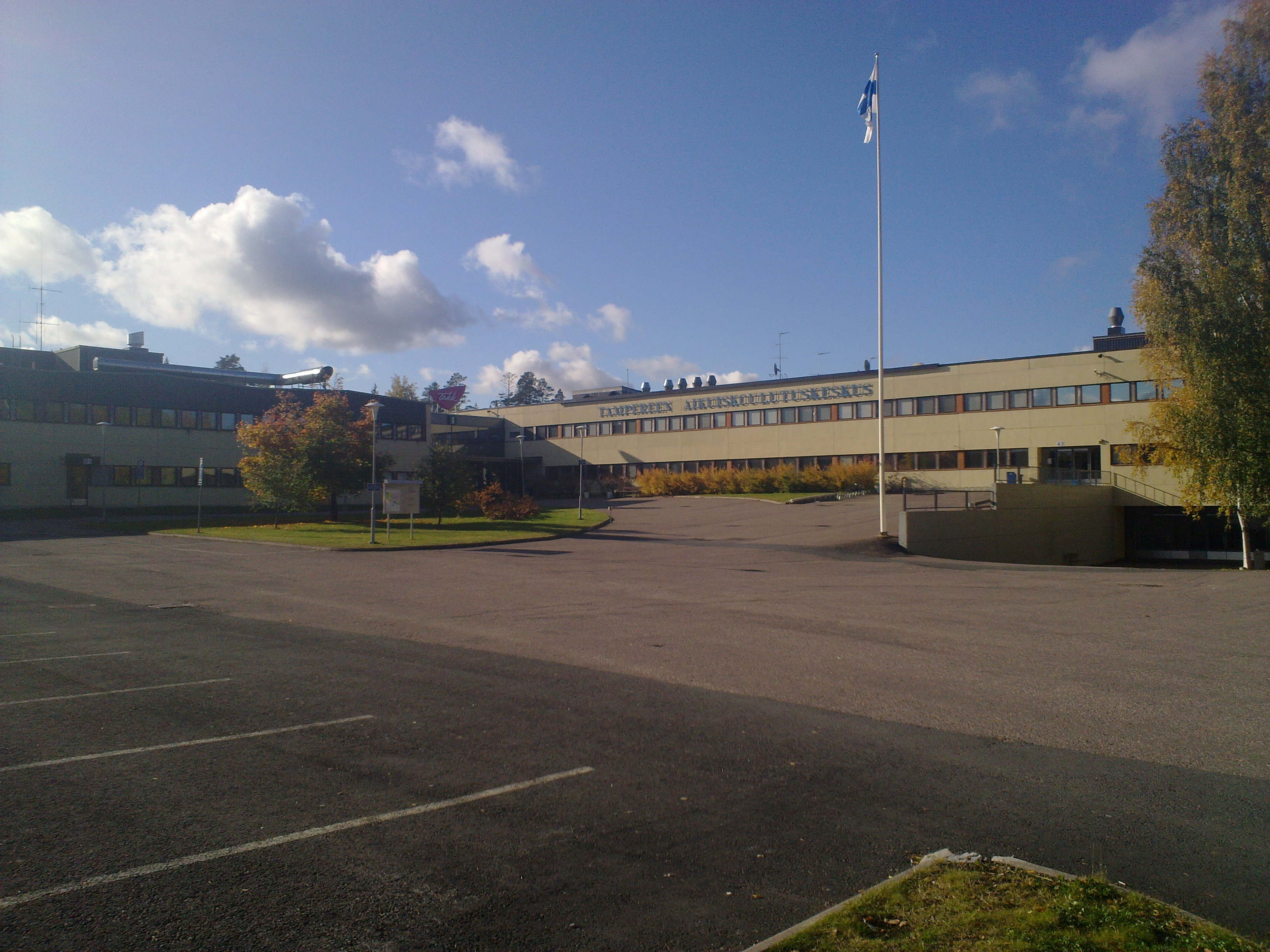 Tampereen Aikuiskoulutuskeskus